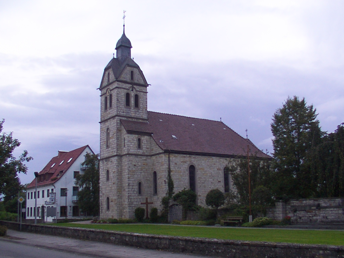 Lichtenau (Westfalen): Katholische Kirche Sankt Magdalena in Husen This is a photograph of an architectural monument.